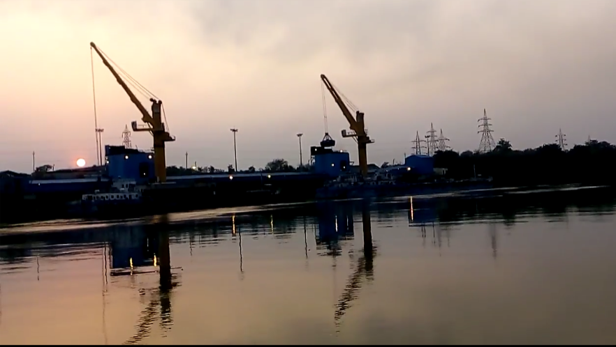 Farakka Port , West Bengal (ফারাক্কা বন্দর, পশ্চিমবঙ্গ)